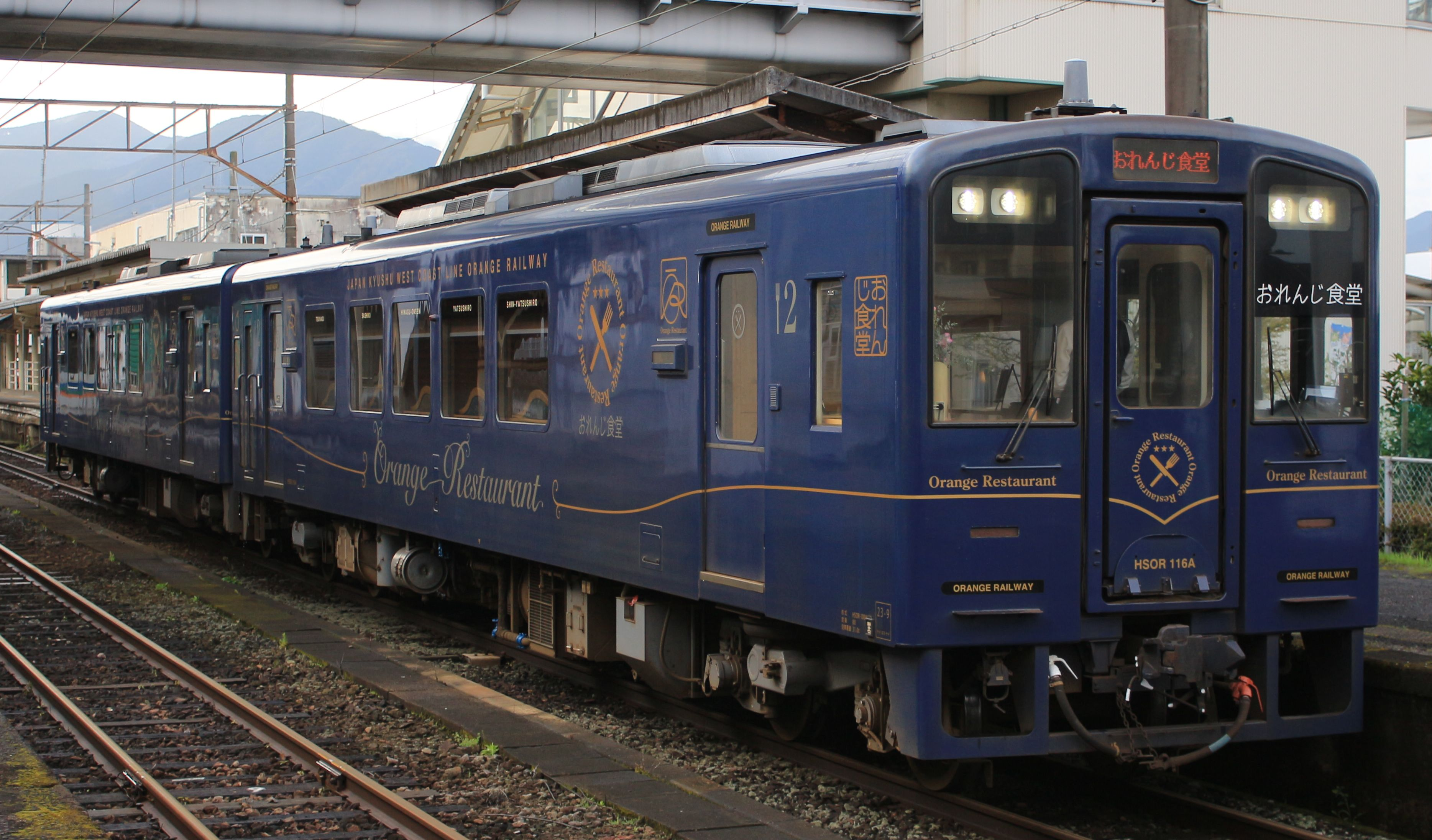 肥薩おれんじ鉄道HSOR-100形気動車